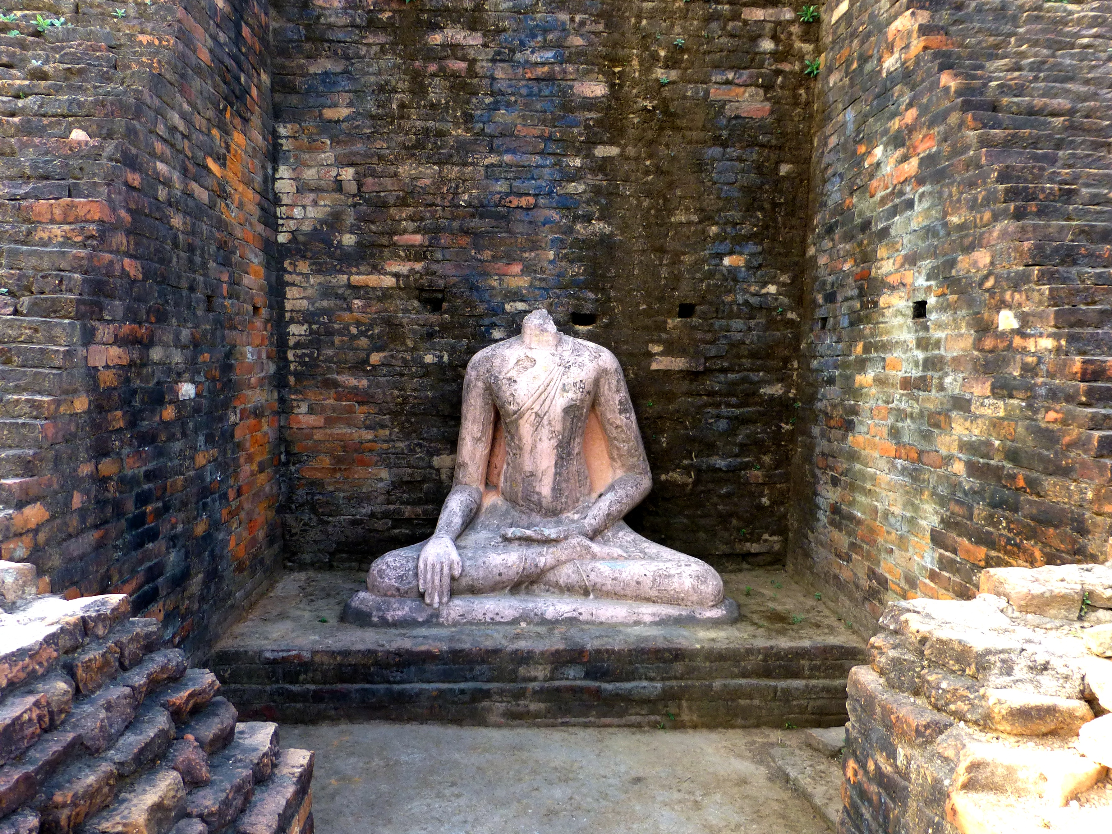 56 Buddha Statue, Kesariya. Photograph from Kesariya, Bihar taken by Anandajoti.